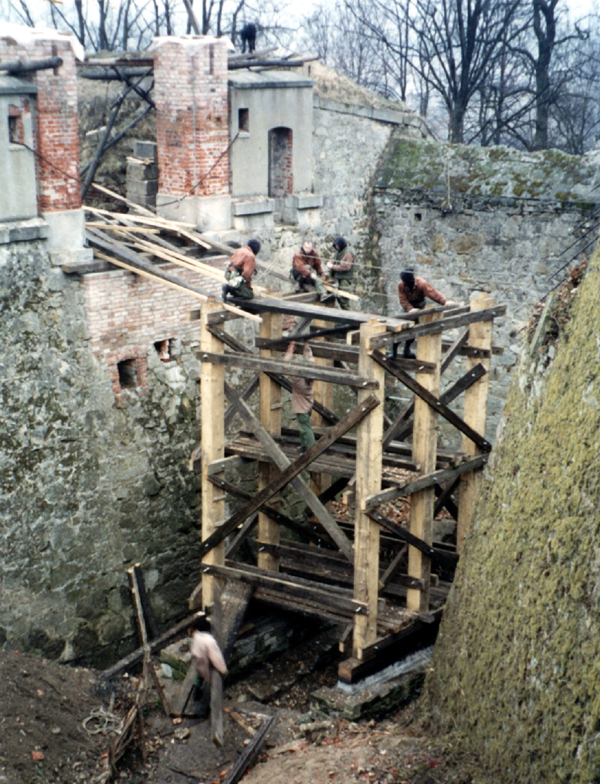 Ośrodek Edukacji Historycznej i Konserwatorskiej - rekonstrukcja XVIIIw. mostu zwodzonego.